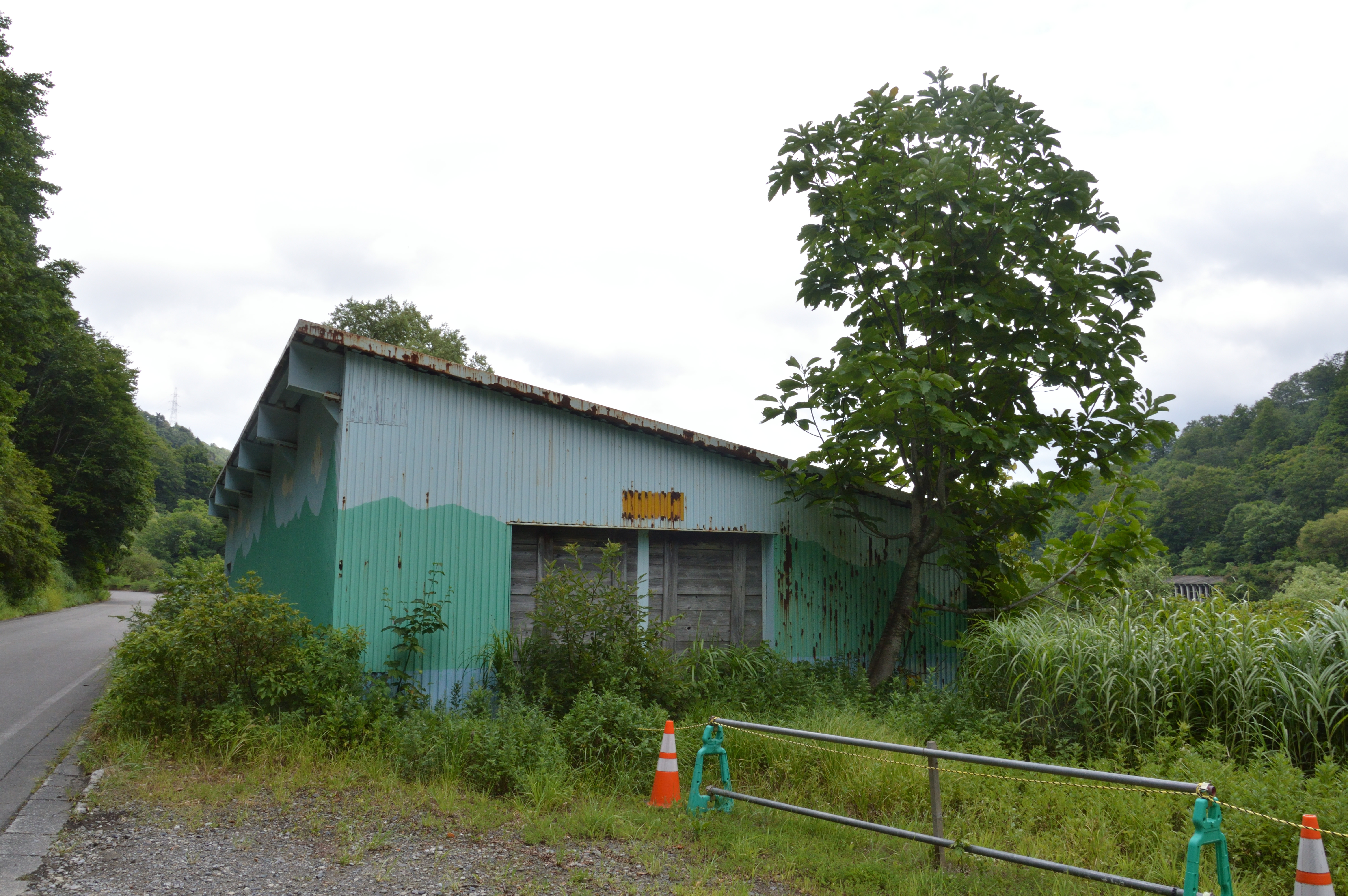 廃止後のJR只見線田子倉駅舎（2018年8月6日）